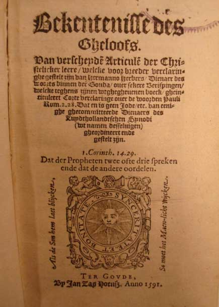 Titelblad "Bekentenisse des gheloofs"